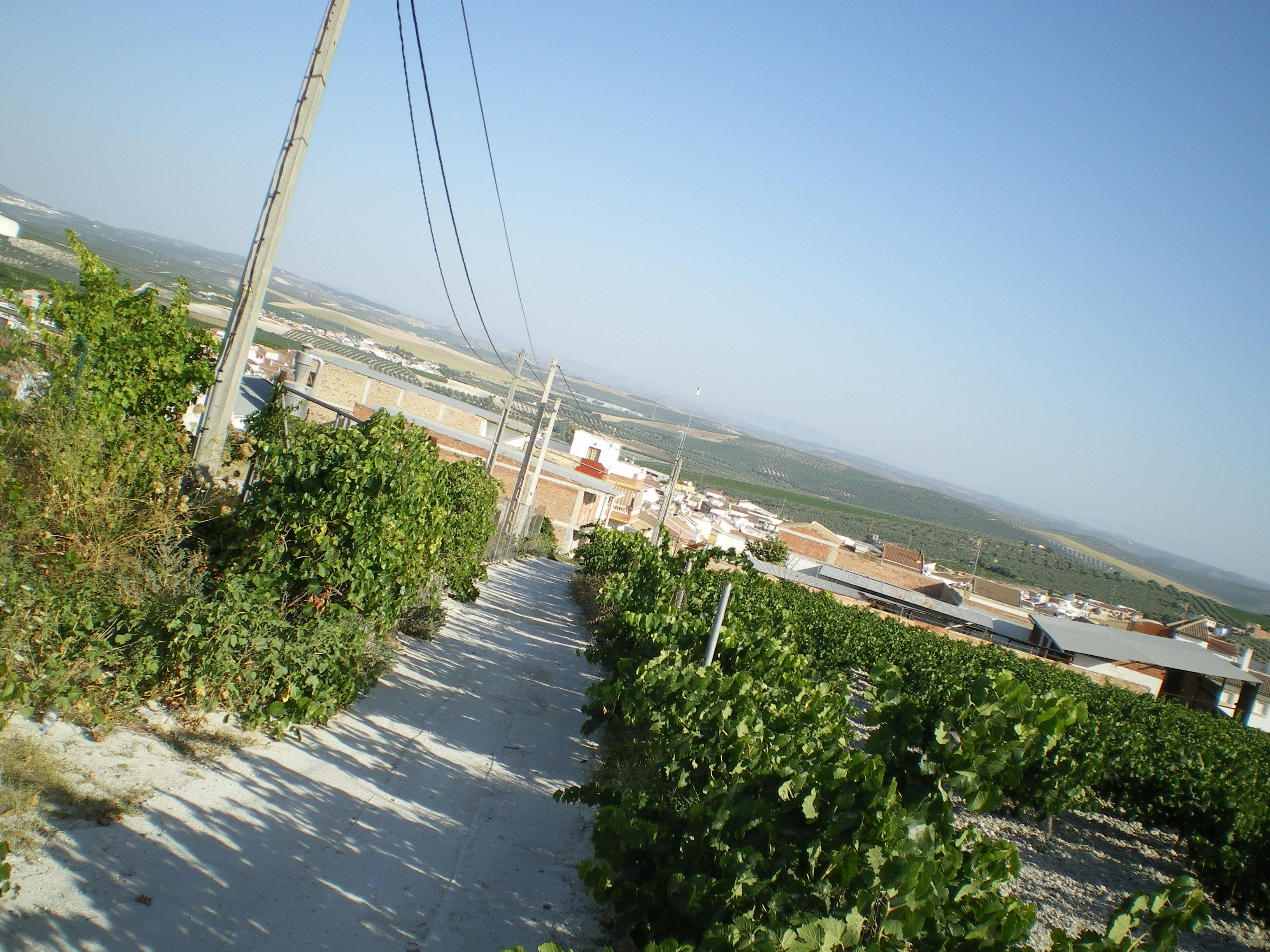 Aragonés: Moriles dende lo deposito monecipal de l'augua.